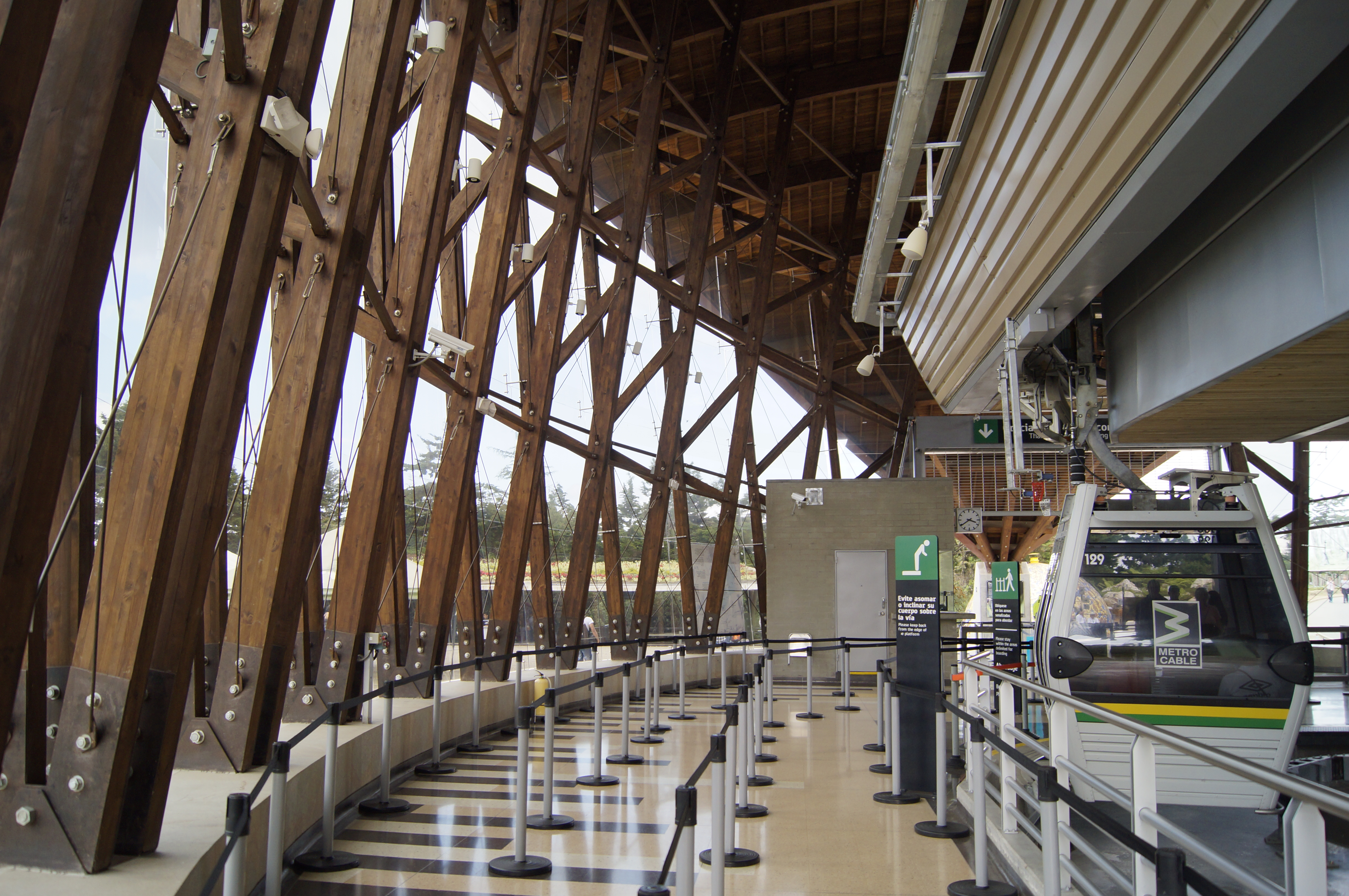 Estación Arví (Metro de Medellín)